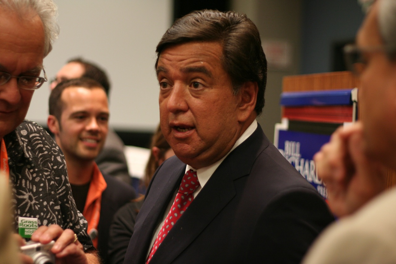 070804_yearlykos_sat_0260.JPG